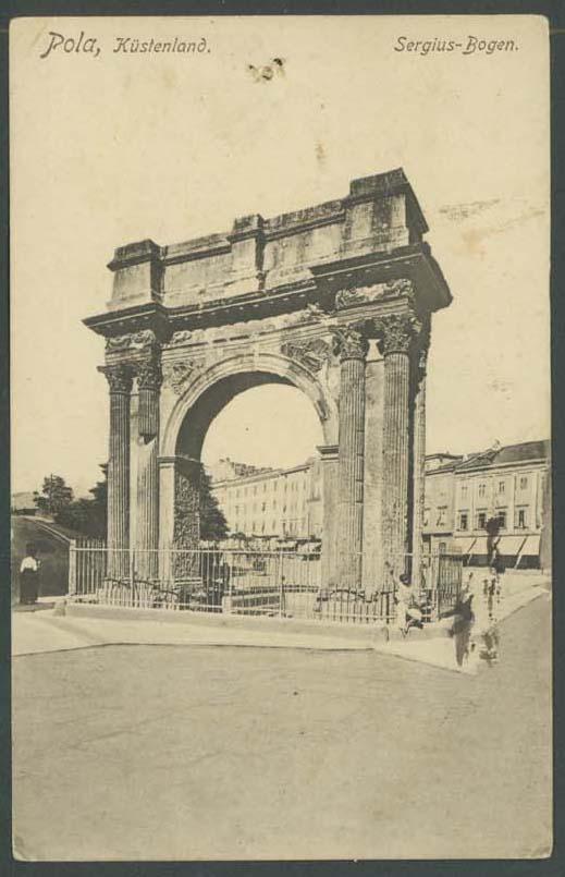 golden gate, austro hungarian empire